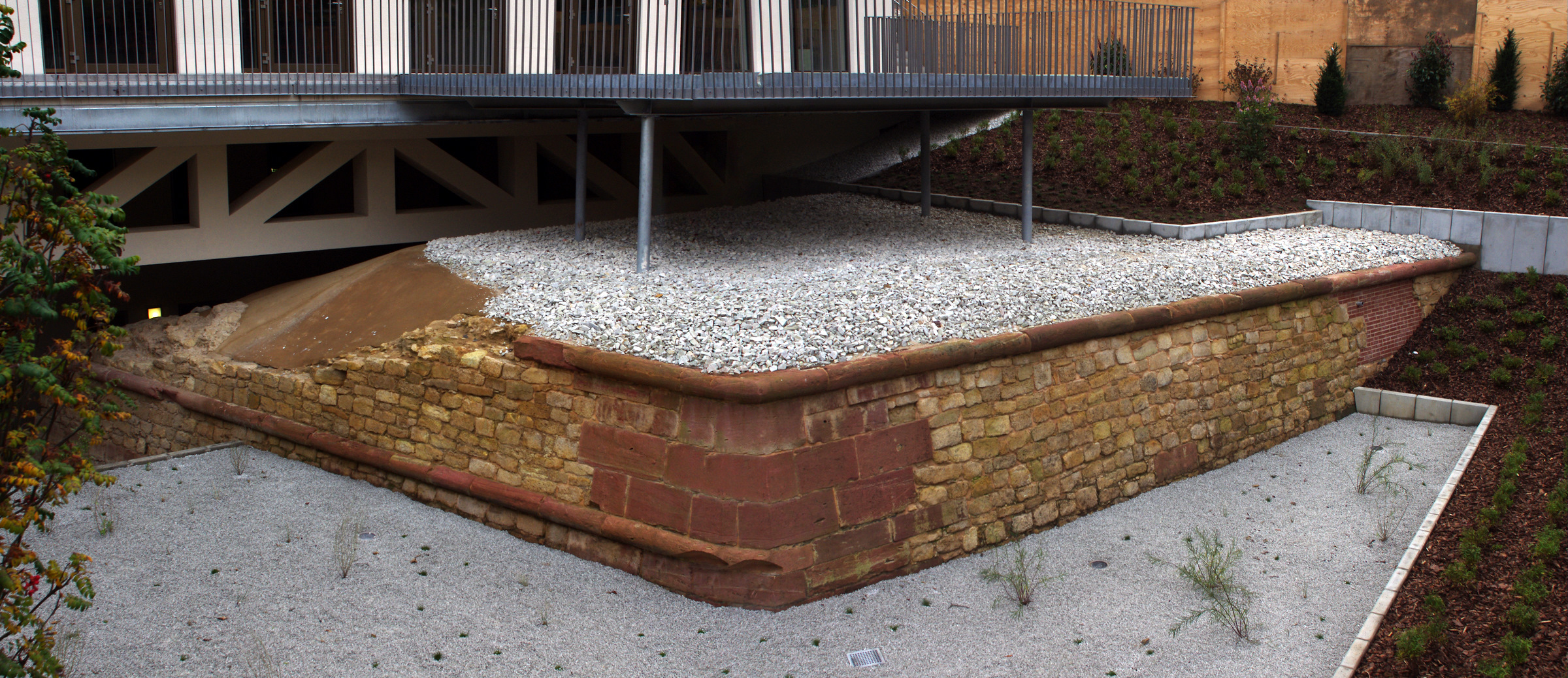 Die Flanke (links) und die rechte Face (rechts) der Bastion am Friedberger Tor, Teil der Frankfurter Stadtbefestigung. Die Mauerreste wurden 2009 auf dem Grundstück Bleichstraße 10 entdeckt und ausgegraben. Darunter befinden sich Kasematten.